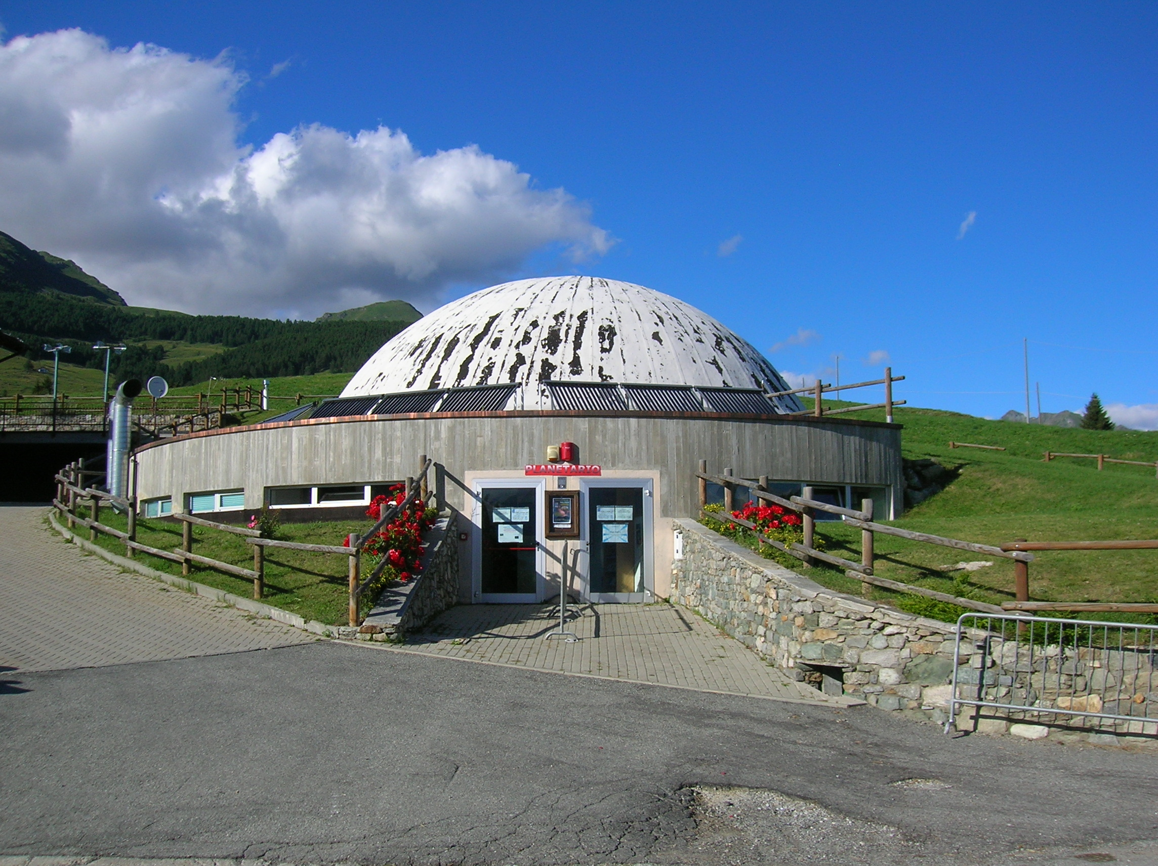 Planetario - Osservatorio astronomico, Lignan, Saint-Barthelemy, Nus, Valle d'Aosta, Italia. This is a photo of a monument which is part of cultural heritage of Italy.